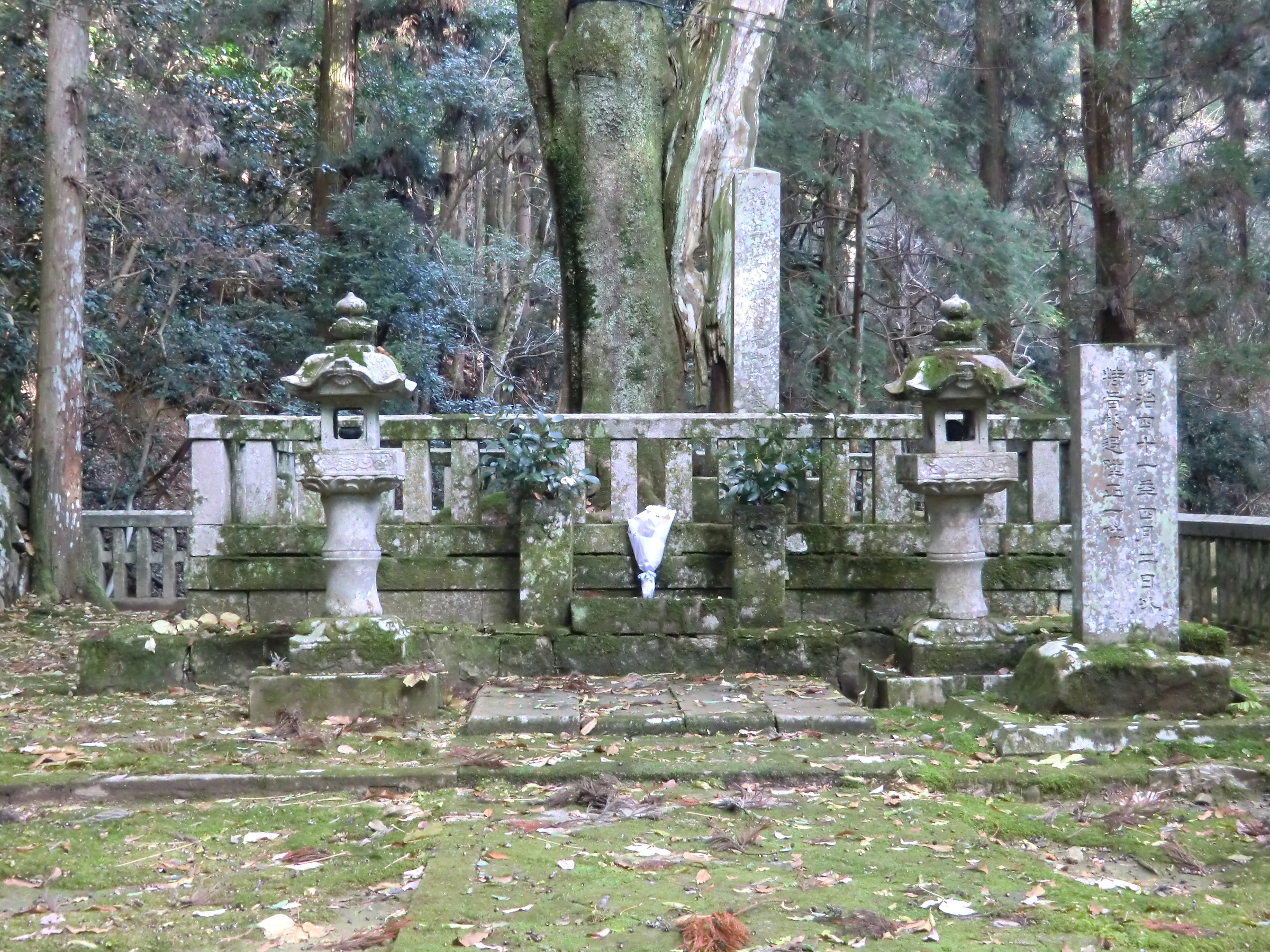 吉田郡山城跡の毛利元就墓所（安芸高田市）